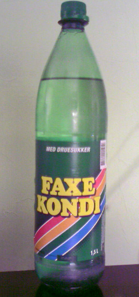 Low-res billede af en typisk 1.5 L Faxe Kondi flaske. Flaskens og etikettens design er for simpelt til selv at opnå værkshøjde og er dermed ikke selv beskyttet af ophavsret.